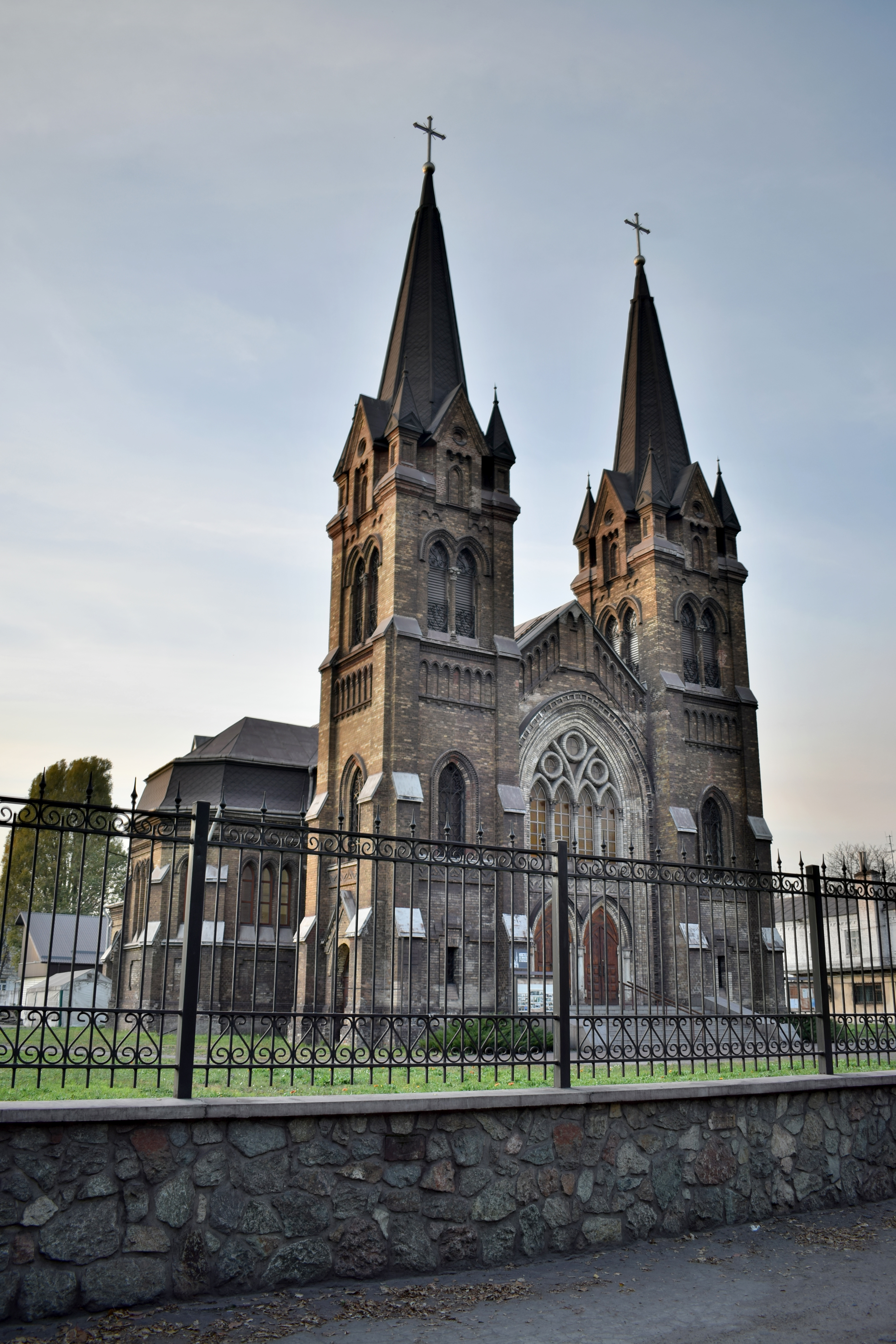 Костел святого Миколая — один з небагатьох уцілілих римо-католицьких храмів у східних областях України. Побудований у 1895-97 роках. Парохіянами тоді були поляки-працівники заводу. Місто в той час називалося Кам’янське. Проектувати костел директор заводу Ігнаціо Ясюкович запросив Маріана Хорманського.